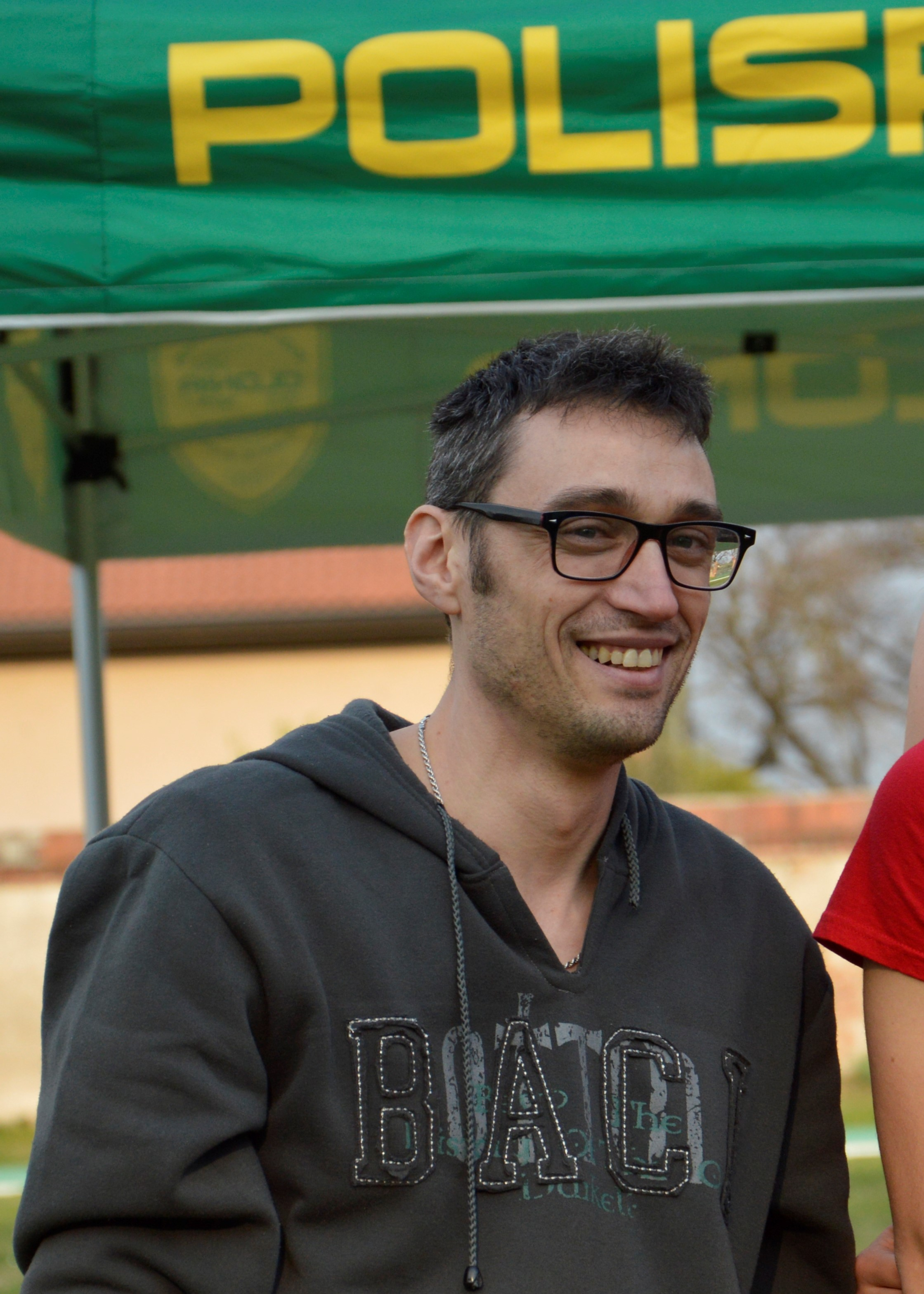 Gianni Carabelli il 7 aprile 2018 a Olgiate Olona (VA).